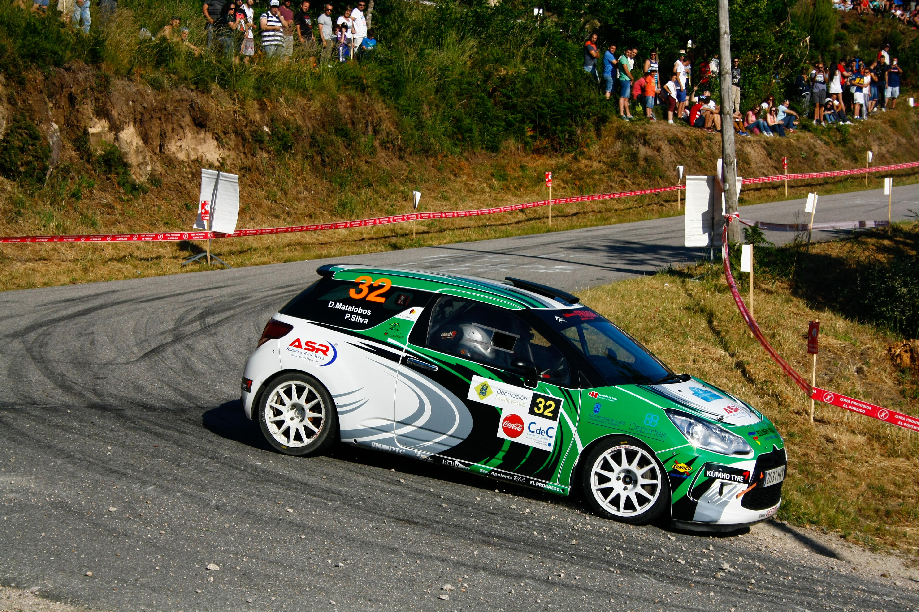 TC 2-4 (Nigrán)